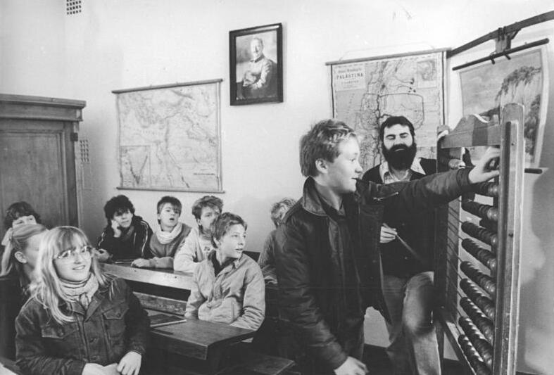 Göldenitz, Jugendstunde im Landschulmuseum ADN-ZB Sindermann 31.10.84 Bez. Rostock: Landschulmuseum. Über die Entwicklung des Bildungswesens in Mecklenburg vom 16. Jahrhundert an informiert hier der Mitarbeiter des Landschulmuseums in Göldenitz Gregor Johannsen Jugendweiheteilnehmer der Alexander-Fadejew-Oberschule in Rostock-Evershagen. In dem alten Klassenzimmer stehen viersitzige Schulbänke, auf denen Lesefibeln, alte Griffelkästen und Schiefertafeln liegen. Die Jugendlichen erfahren, wie in der Zeit der Rittergutsbesitzer die Landarbeiterkinter in der Einklassenschule mit dem Rohrstock zu Demut und Gehorsam gegenüber dem Staat und der Kirche erzogen wurden. siehe dazu auch die Fotos 1984-1031-7 u.9.N